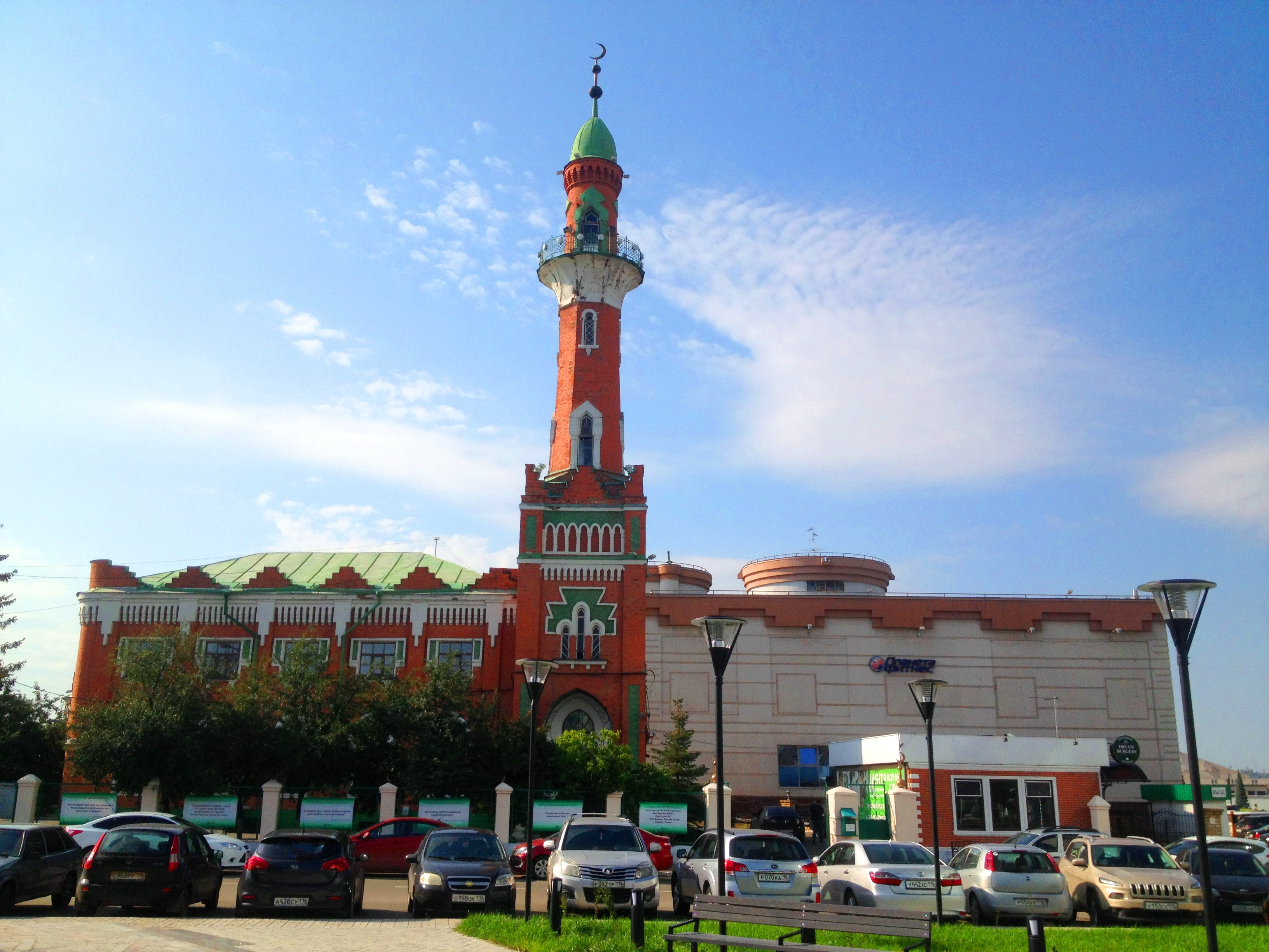 Мечеть Закабанная (Юбилейная) (минаретное завершение мечети Закабанной): улица Хади Такташа, 26, Казань, Татарстан